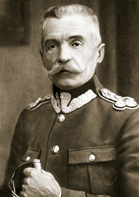 Generał Filip Stanisław Dubiski - organizator i dowódca Dywizji Strzelców Wielkopolskich.